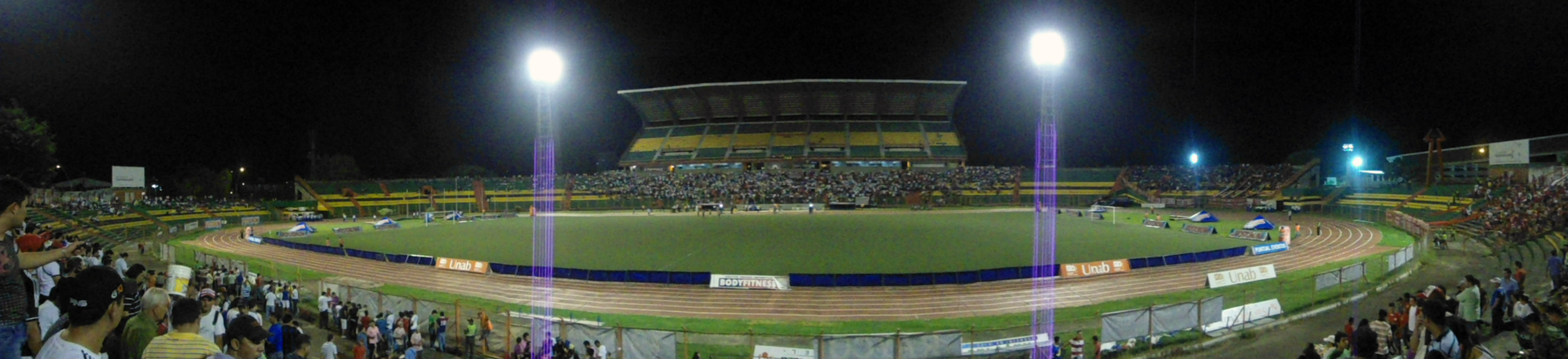 Panoramica del Estadio Alfonso López